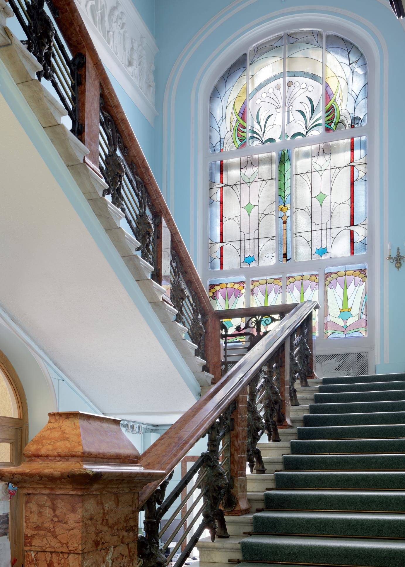 Особняк Миндовского, Москва, ул. Поварская, д. 44/2. Парадная лестница.